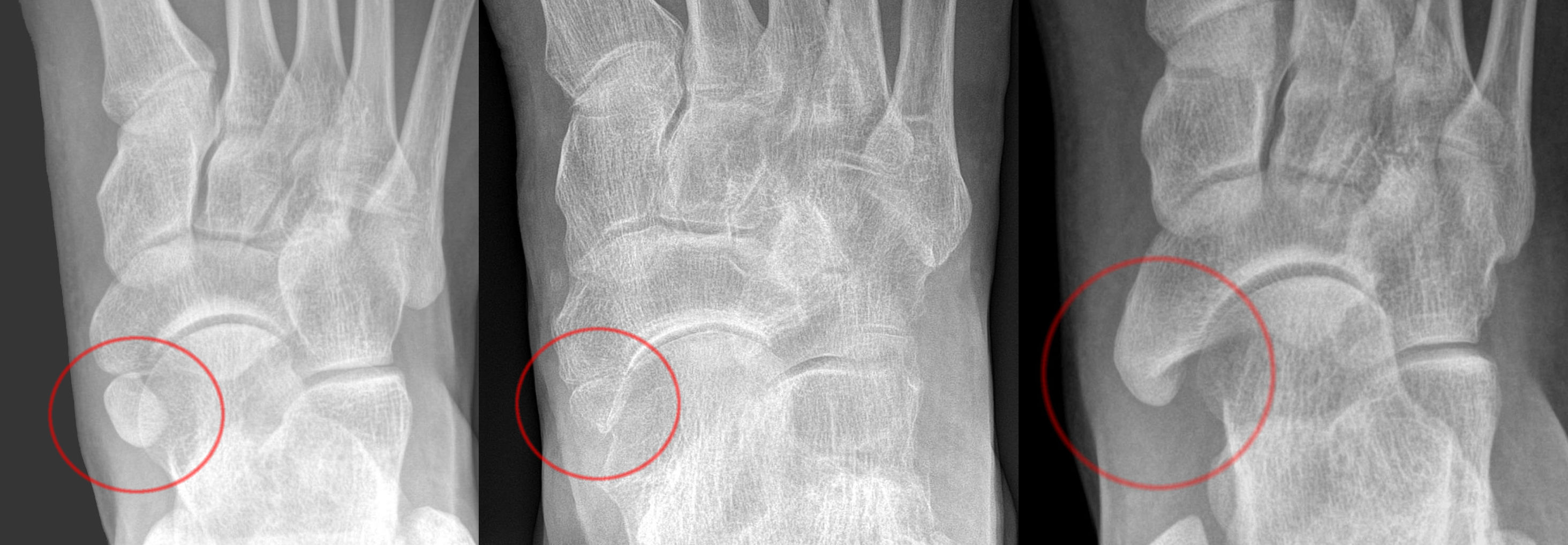 Os tibiale externum - Klassifikation nach Geist: Von links nach rechts Typ 1 bis 3.